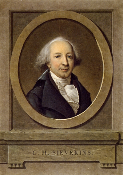 Georg Heinrich Sieveking (1751-1799), Hamburger Kaufmann